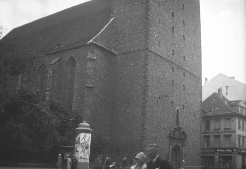 Katharinenkirche Motiv: Magdeburg Kategori: (01) Exteriörer, detaljer Katharinenkirche.